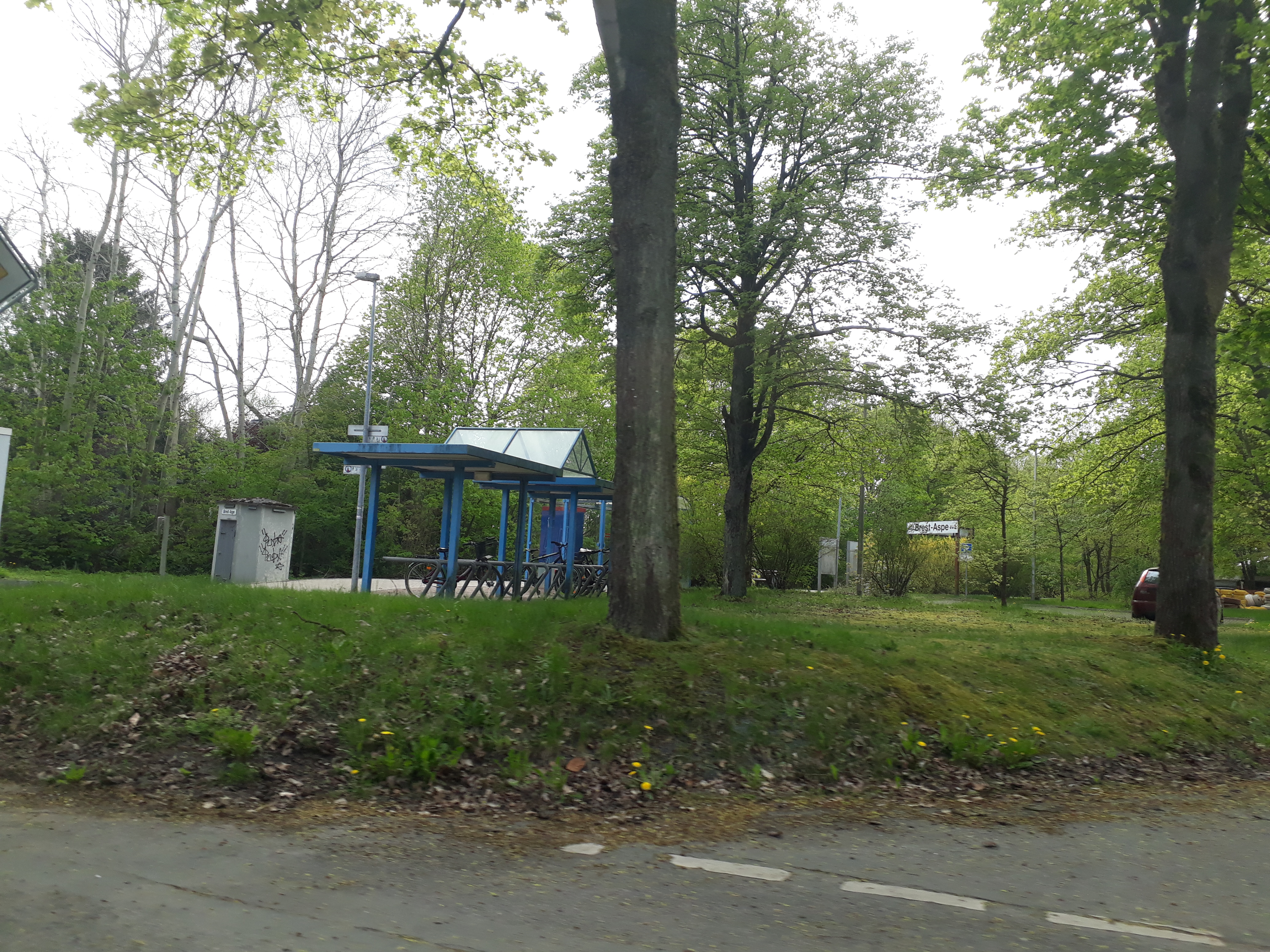 Bahnhof in Brest-Aspe, Landkreis Stade (Nds.)